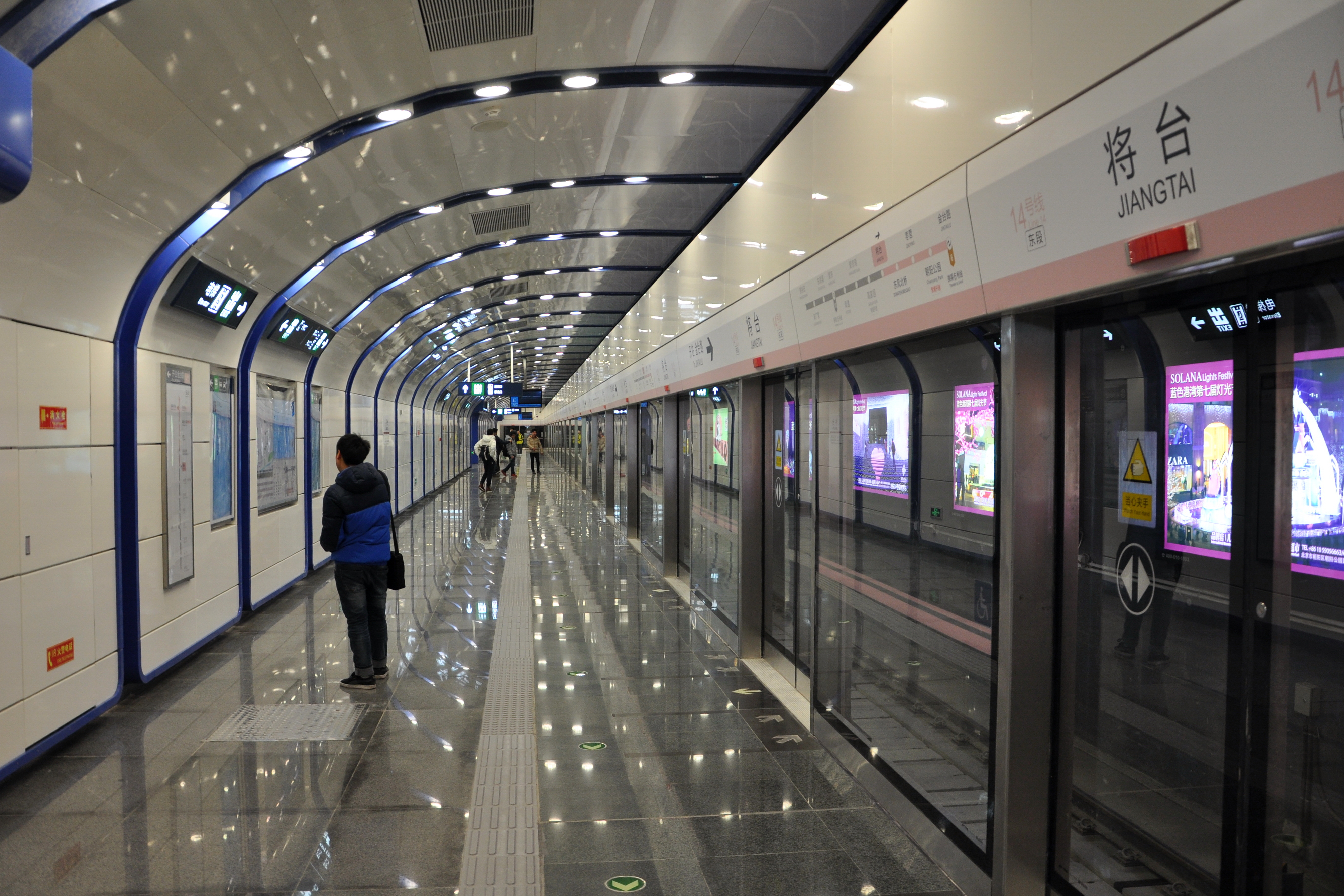 北京地铁14号线将台站站台